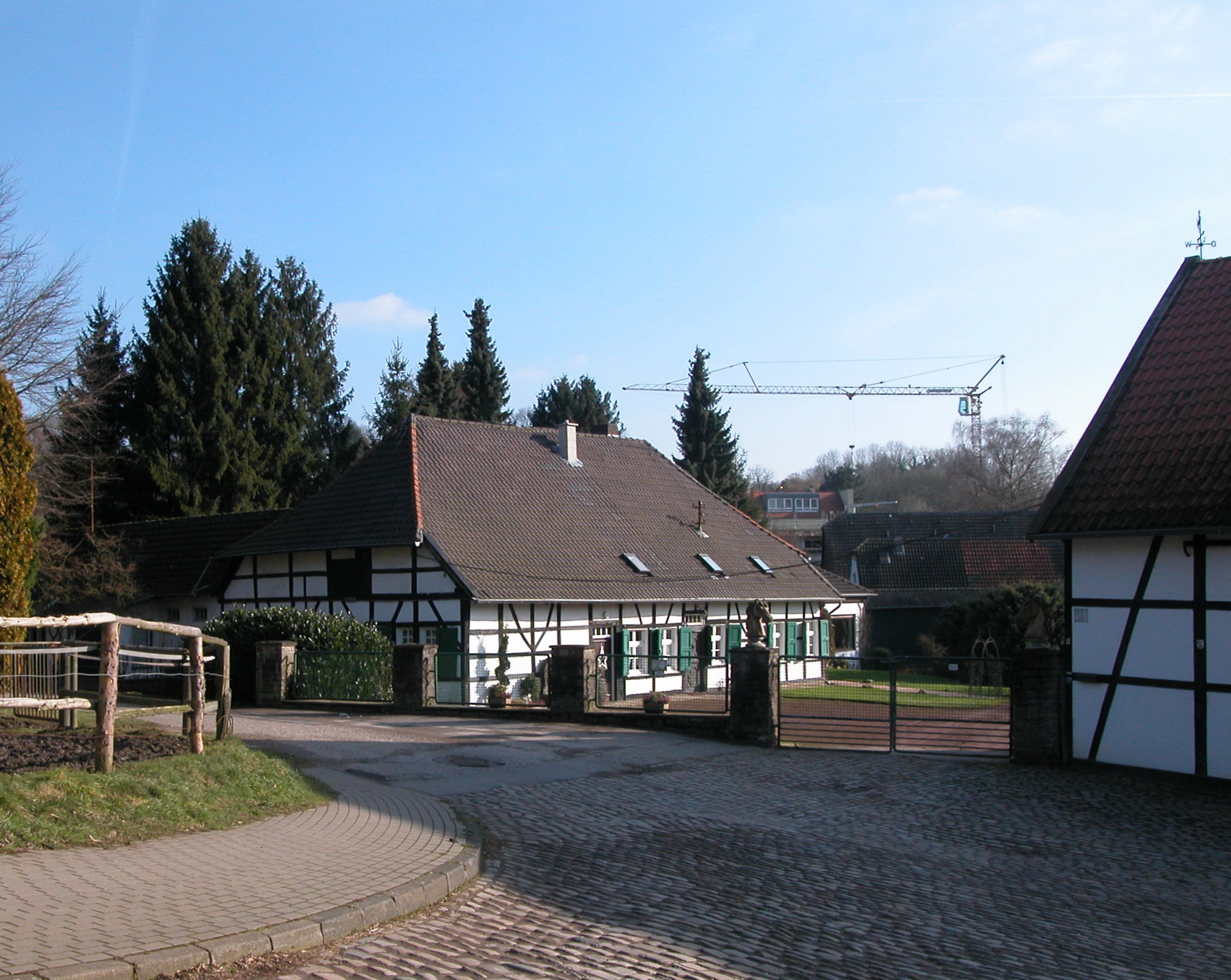 Lierhaushof am Eingang zum Forstbachtal Kamera-Position: Forstbachtal